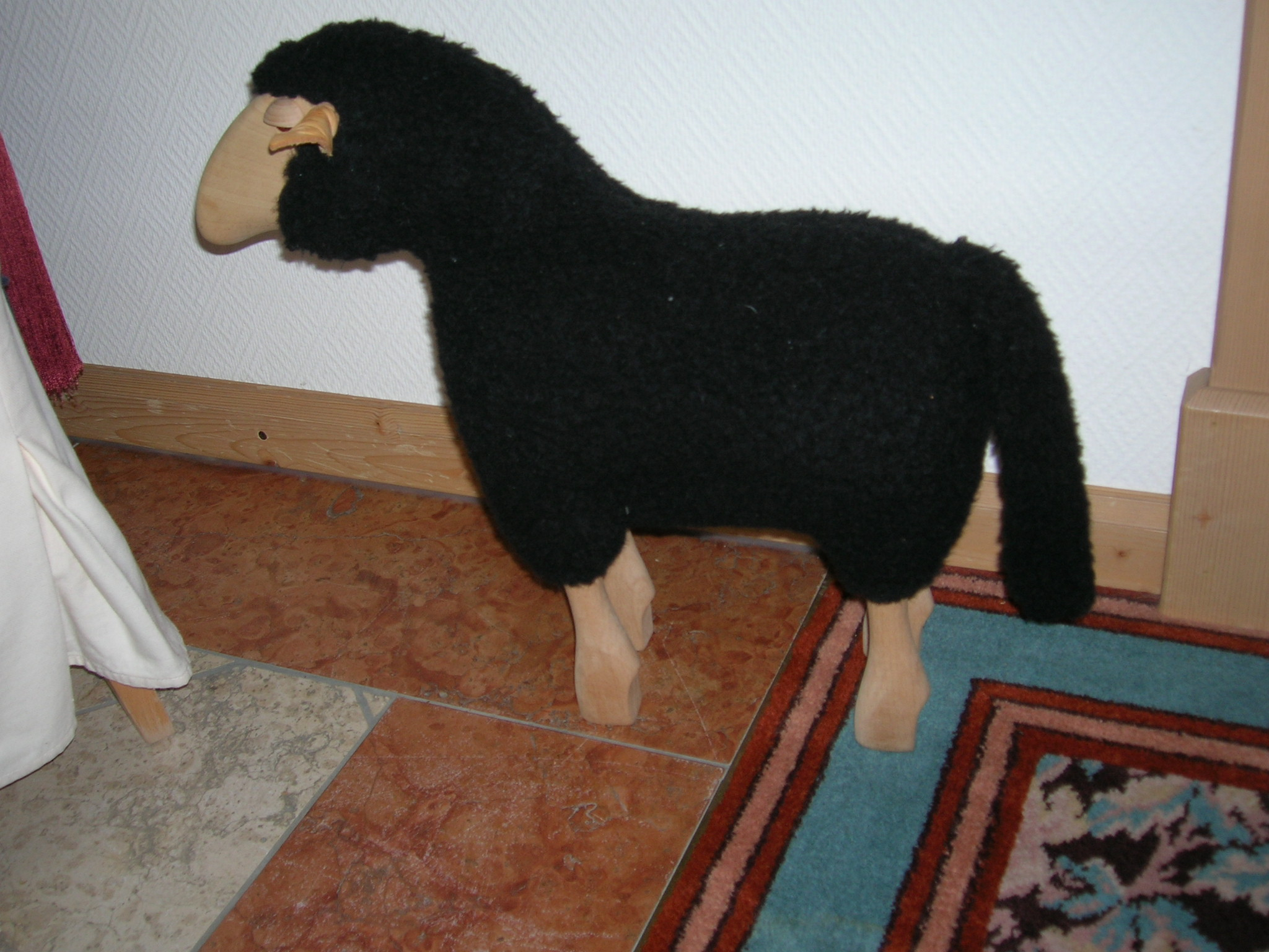 Schwaarzt Schof